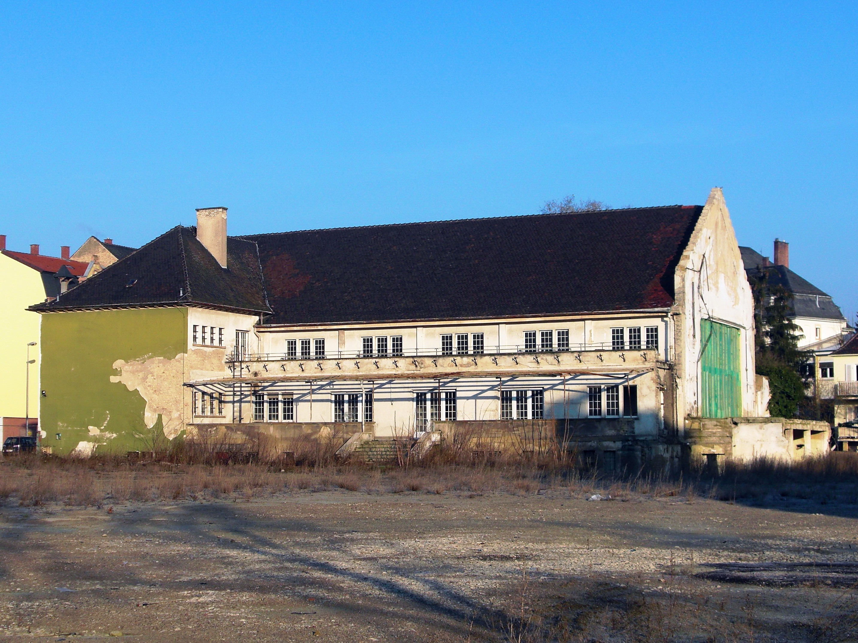 Die Rückseite des Feierabendhaus (ohne den abgerissenen Bühnenbau) in Frankenthal.